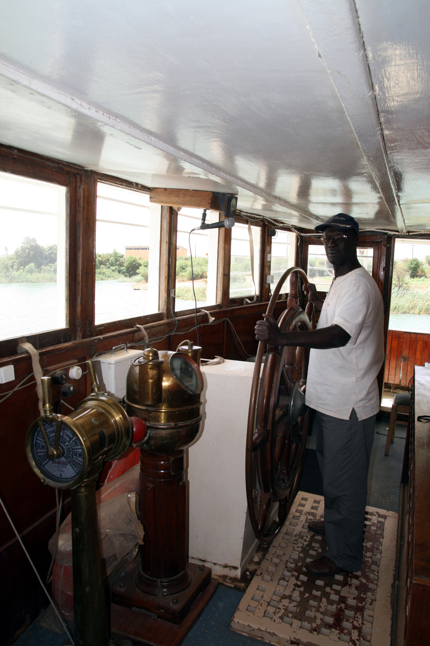 Bou El Mogdad, commandant sur la passerelle